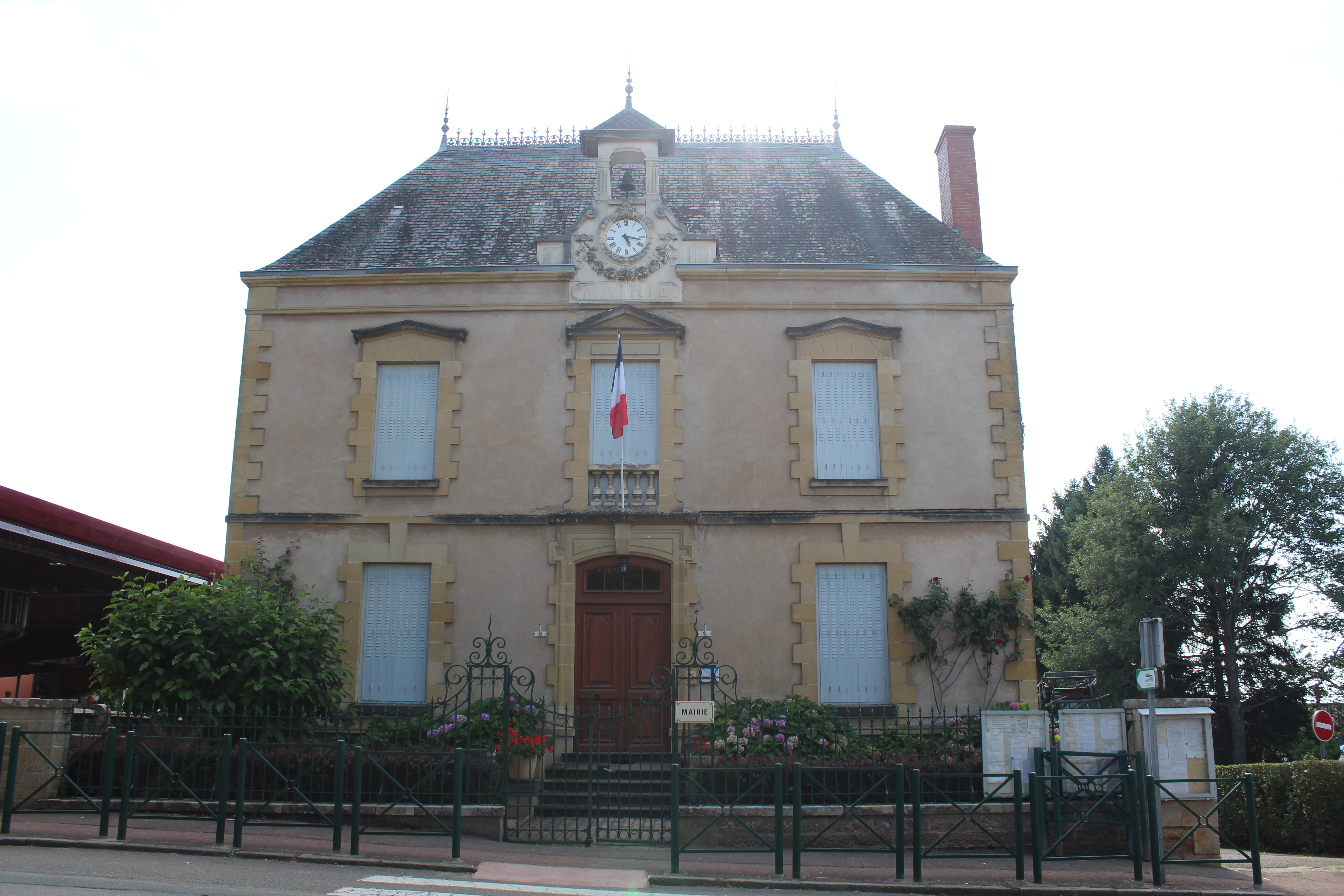 Mairie de Saint-Christophe-en-Brionnais.